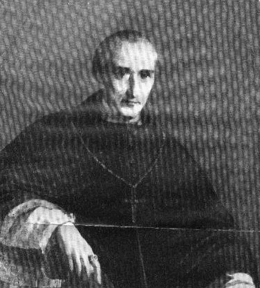 Josef Dittrich (1794 - 1853), Český katolický biskup, pedagog a bolzanista.